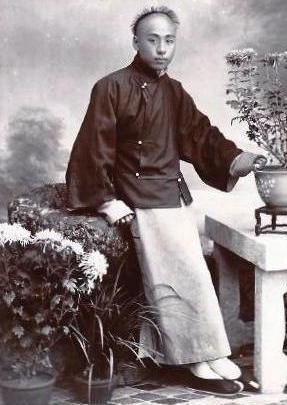 中文（中国大陆）: 安裕钱庄董事长方季扬